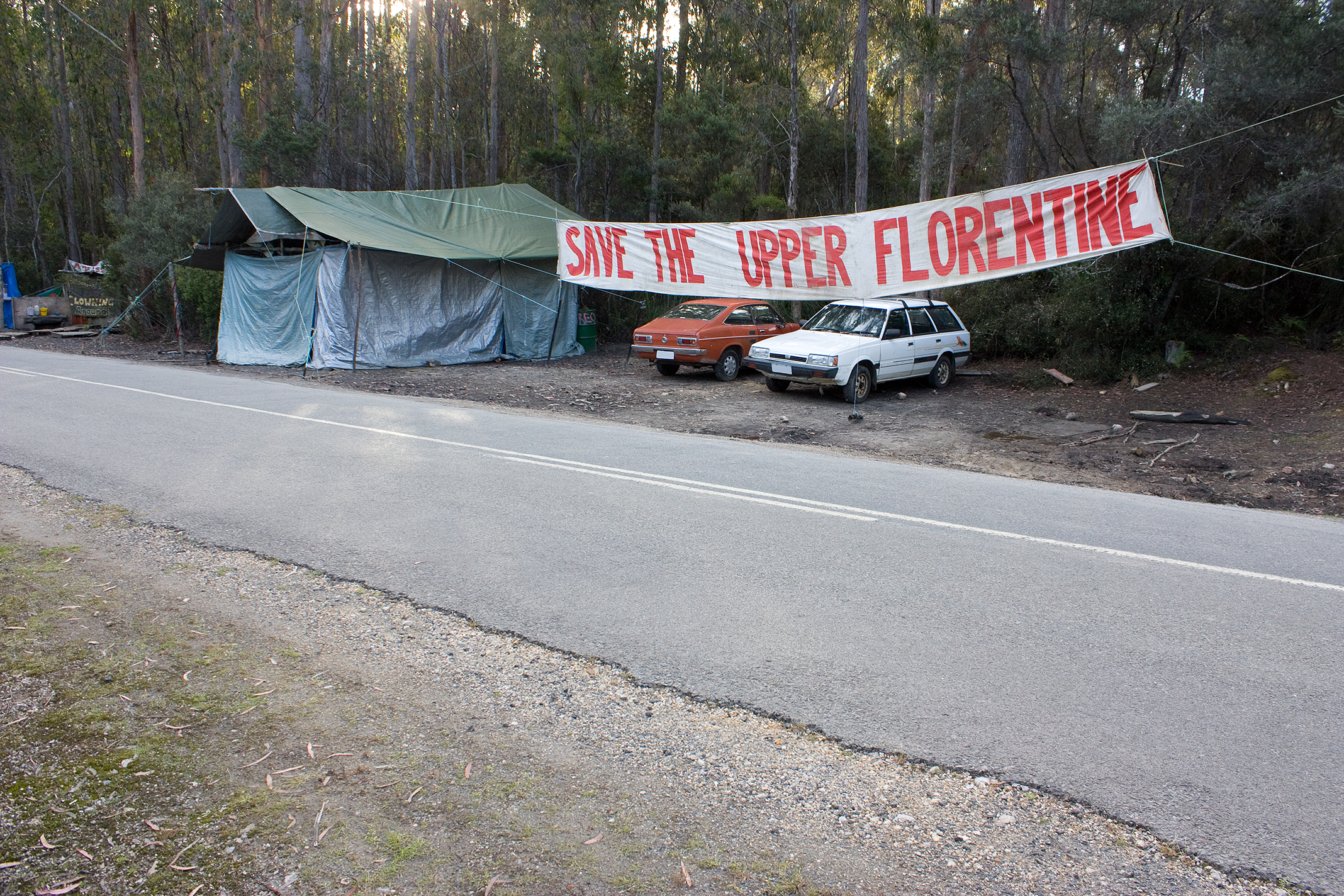 Upper Florentine Protest Camp